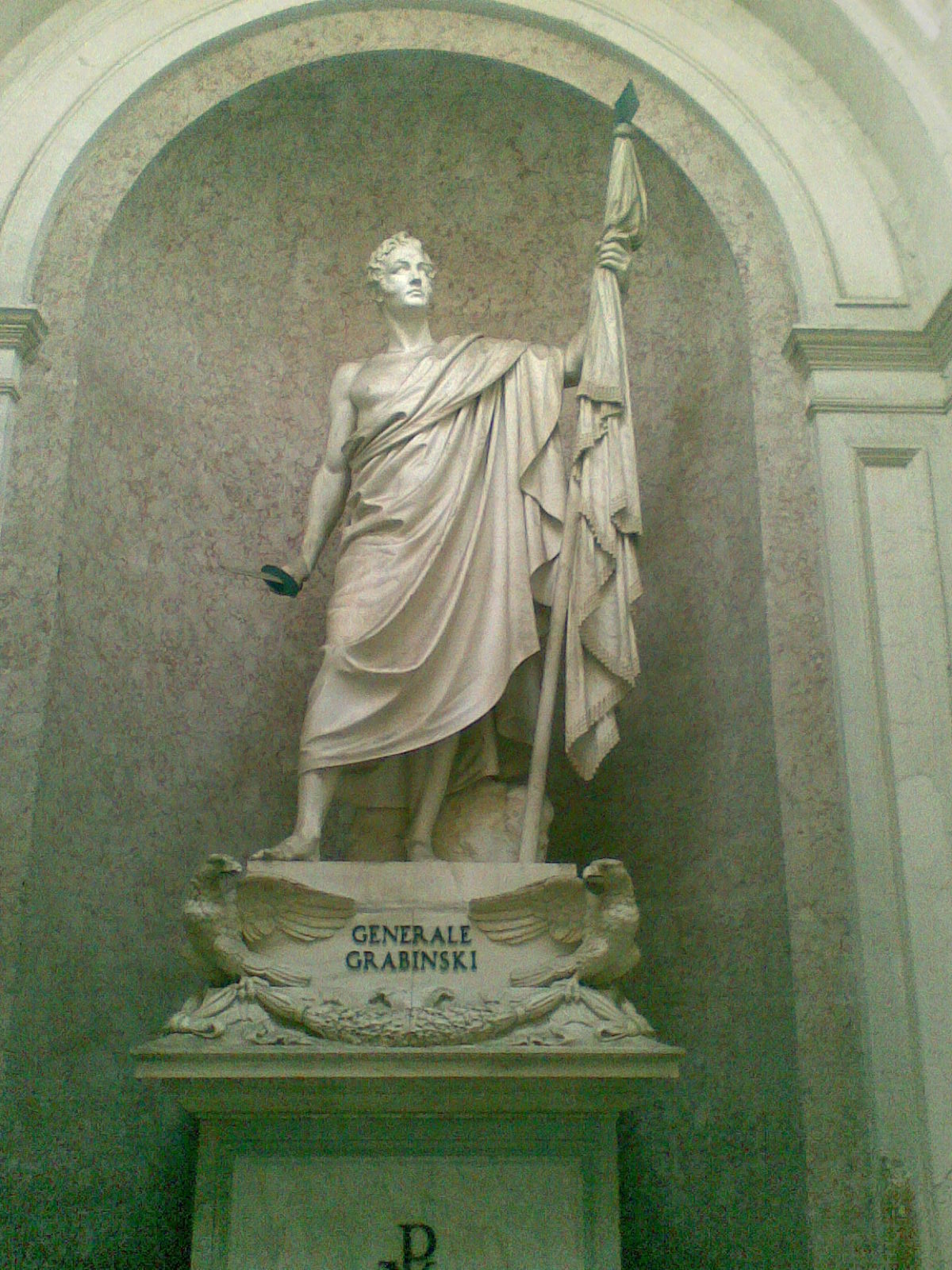 Józef Joachim Grabiński herbu Pomian (ur. 1771 Warszawa - zm. 1843 San Martino Włochy). Generał brygady armii Księstwa Warszawskiego, generał dywizji armii włoskiej. Od 1791 chorąży 8 regimentu pieszego wojsk litewskich. W 1792 walczył z interwencja rosyjską, odznaczył się pod Brześciem Litewskim i odznaczony został Virtuti Militari. Podczas powstania kościuszkowskiego 1794 dosłużył się stopnia pułkownika. Bronił Pragi i dostał się do niewoli rosyjskiej. Wywieziony do Petersburga, w 1797 uzyskał zezwolenie na wyjazd do Paryża, skąd udał się do Mediolanu. Tam wstąpił do Legionu J. H. Dąbrowskiego. Dowódca batalionu w 1 Legii. Odbył wszystkie kampanie przeciwko Austrii. Legia uniknęła w 1797 wyjazdu na wyspę Hispaniolę (Santo Domingo), służyła w Republice Cisalpińskiej. Grabiński dowodził polską piechotą w bitwie pod Castelfranco. Potem jako oficer francuskich huzarów uczestniczył w wyprawach Napoleona I do Egiptu. Brał udział w szturmie Aleksandrii i bitwie pod piramidami. w drodze powrotnej do Francji dostał się do niewoli korsarzy tureckich. Więziony w Konstantynopolu. Po złożeniu okupu powrócił w 1799 do Paryża. W 1800 czasowo dowódca 1 Brygady Legii włoskiej gen. J. H. Dąbrowskiego. W 1801 szef półbrygady polskiej legionów polskich, należącej do Księstwa Warszawskiego. Generał z 1807 na stanowisku dowódcy Legii Polsko-Włoskiej (później Nadwiślańskiej). W 1808 wziął urlop i osiedlił sie we Włoszech. Później w służbie włoskiej walczył przeciwko bandom rabunkowym. W 1830 dowódca wojsk powstańczych w Bolonii w stopniu generała dywizji. Poniósł klęskę i pozostał poza wojskiem. Pochowany na cmentarzu w Bolonii.